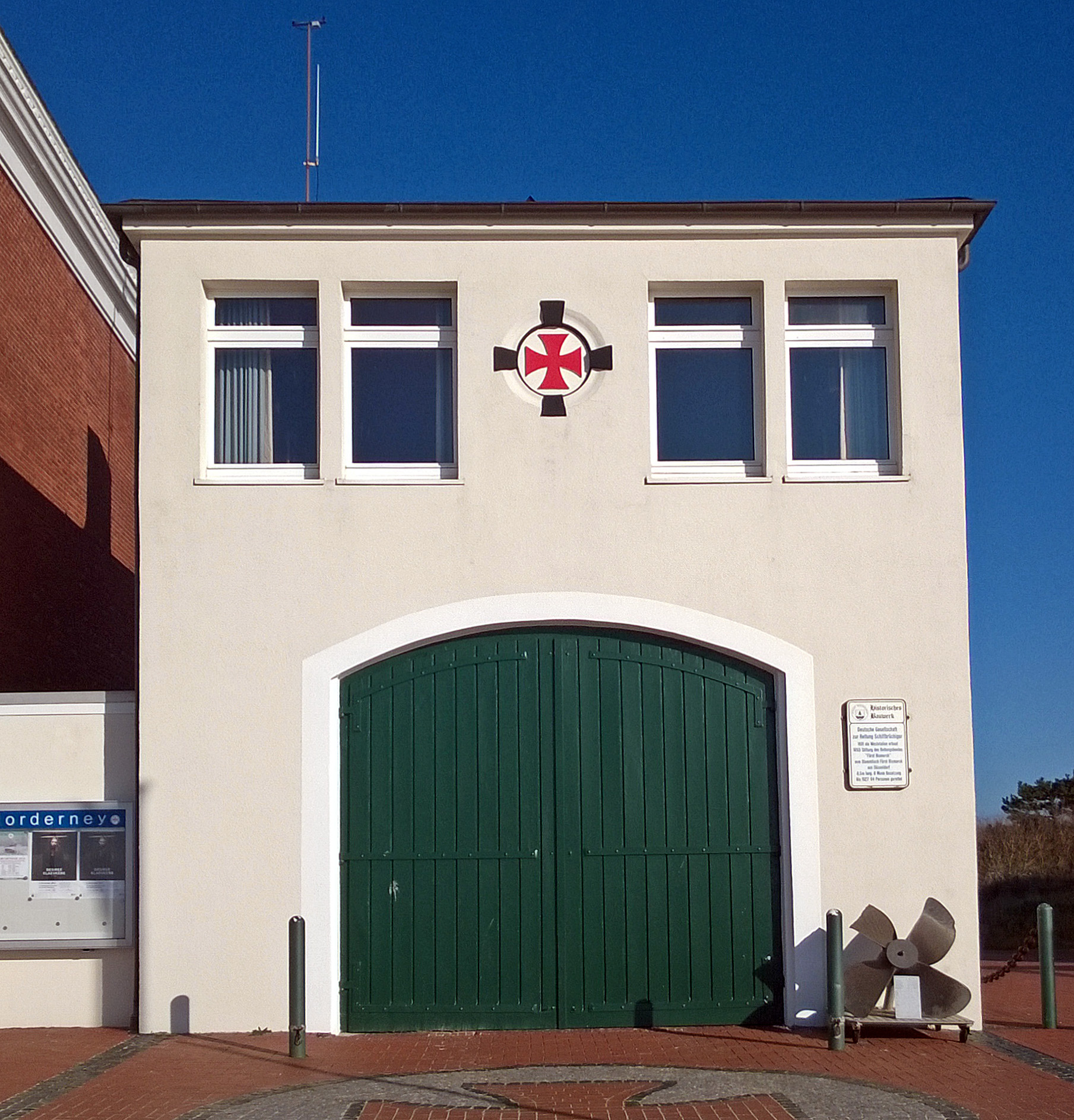 ehem. Rettungsbootschuppen der DGzRS auf Norderney